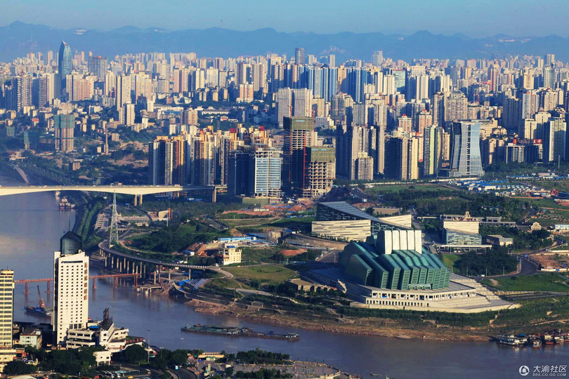 飞机上鸟瞰江北嘴和朝天门